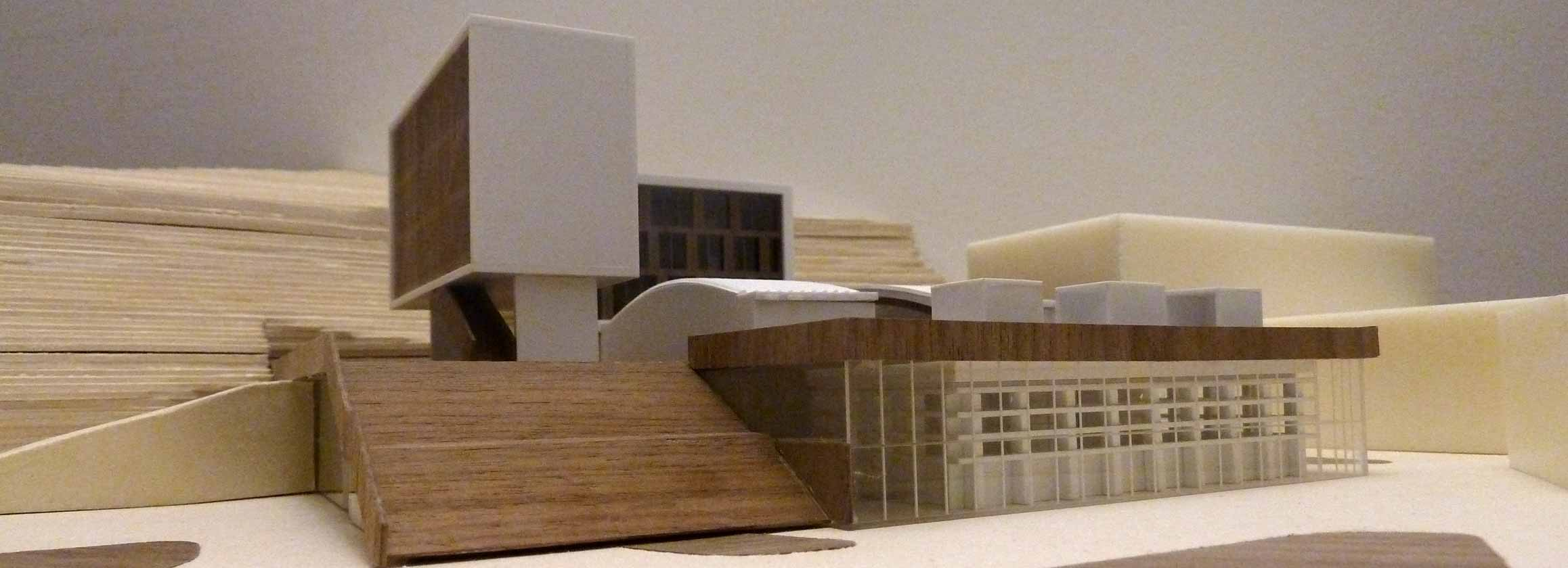 Prospetto Zhou Shan